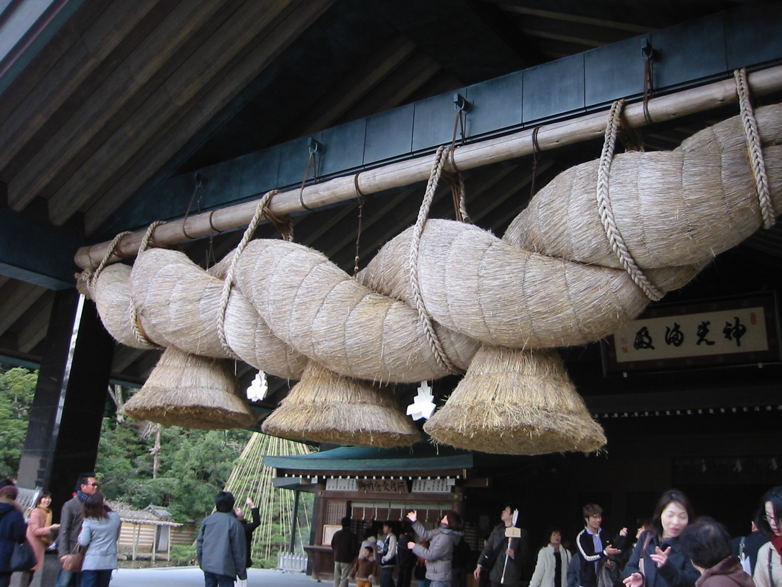 出雲大社注連縄